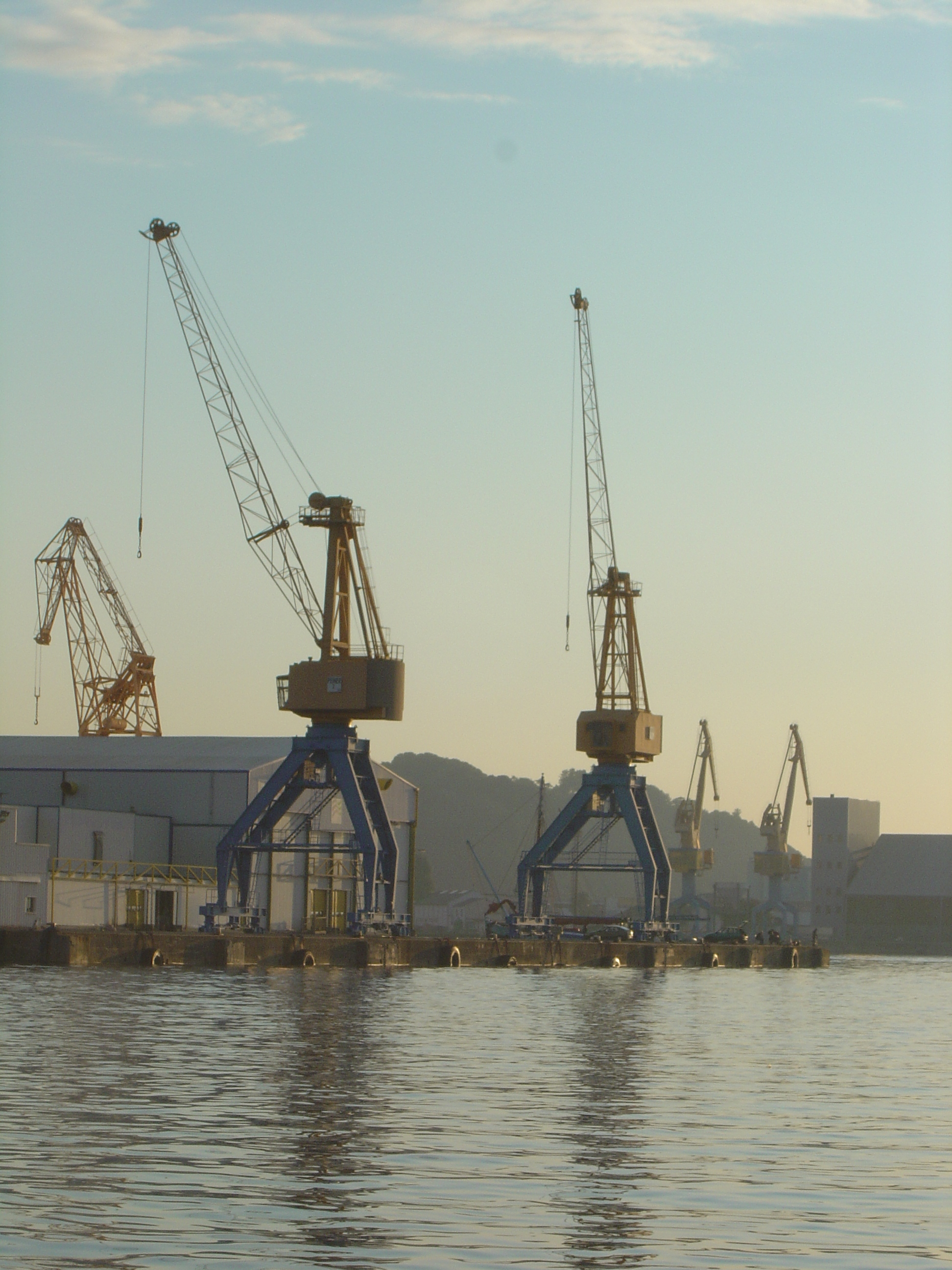 Grues sur le port de commerce de Brest